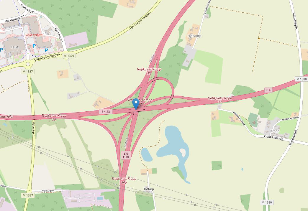 Trafikplats Kropp utanför Helsingborg